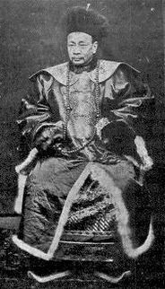 Photographie de Tang Jingsong 文言: 唐景崧 Bân-lâm-gú: Tông Kíng-siông 唐景崧